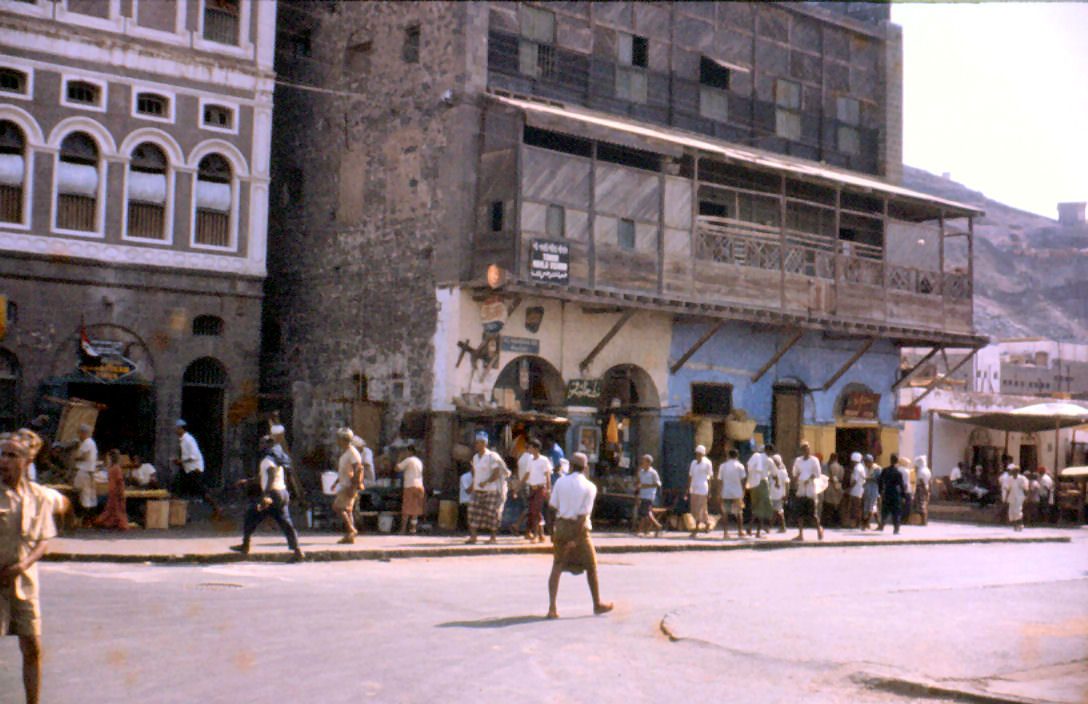 Aden street market in 1960 — Yemen.Aden 1960 2